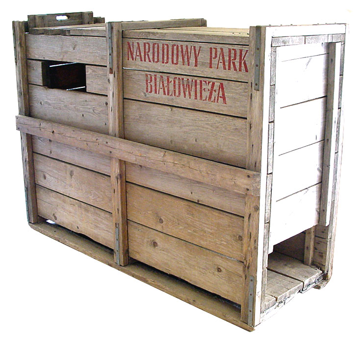 Caisse de transport ayant servi au transfert de bisons polonais en France (Margeride).